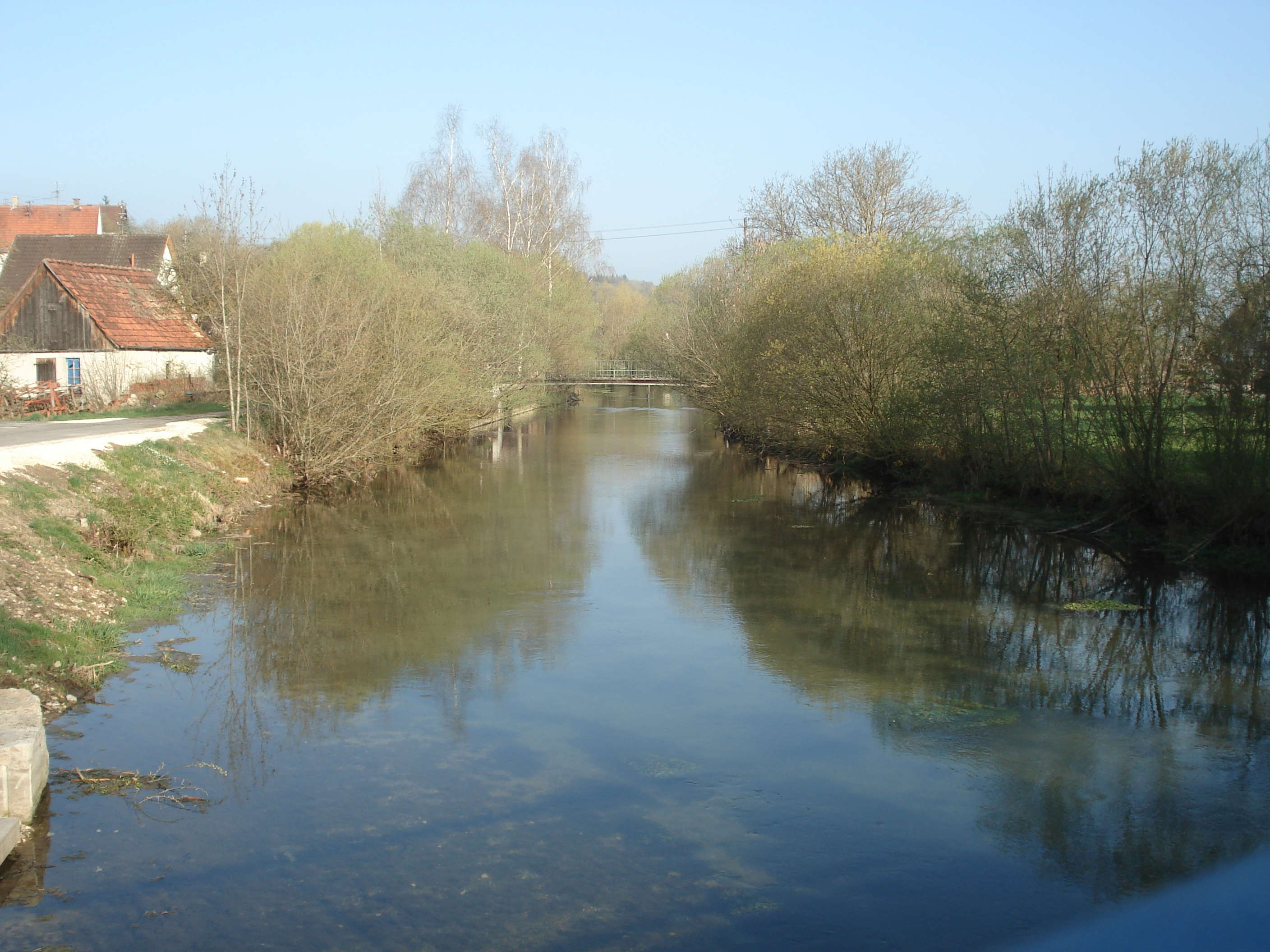 Die Egau in Ballmertshofen